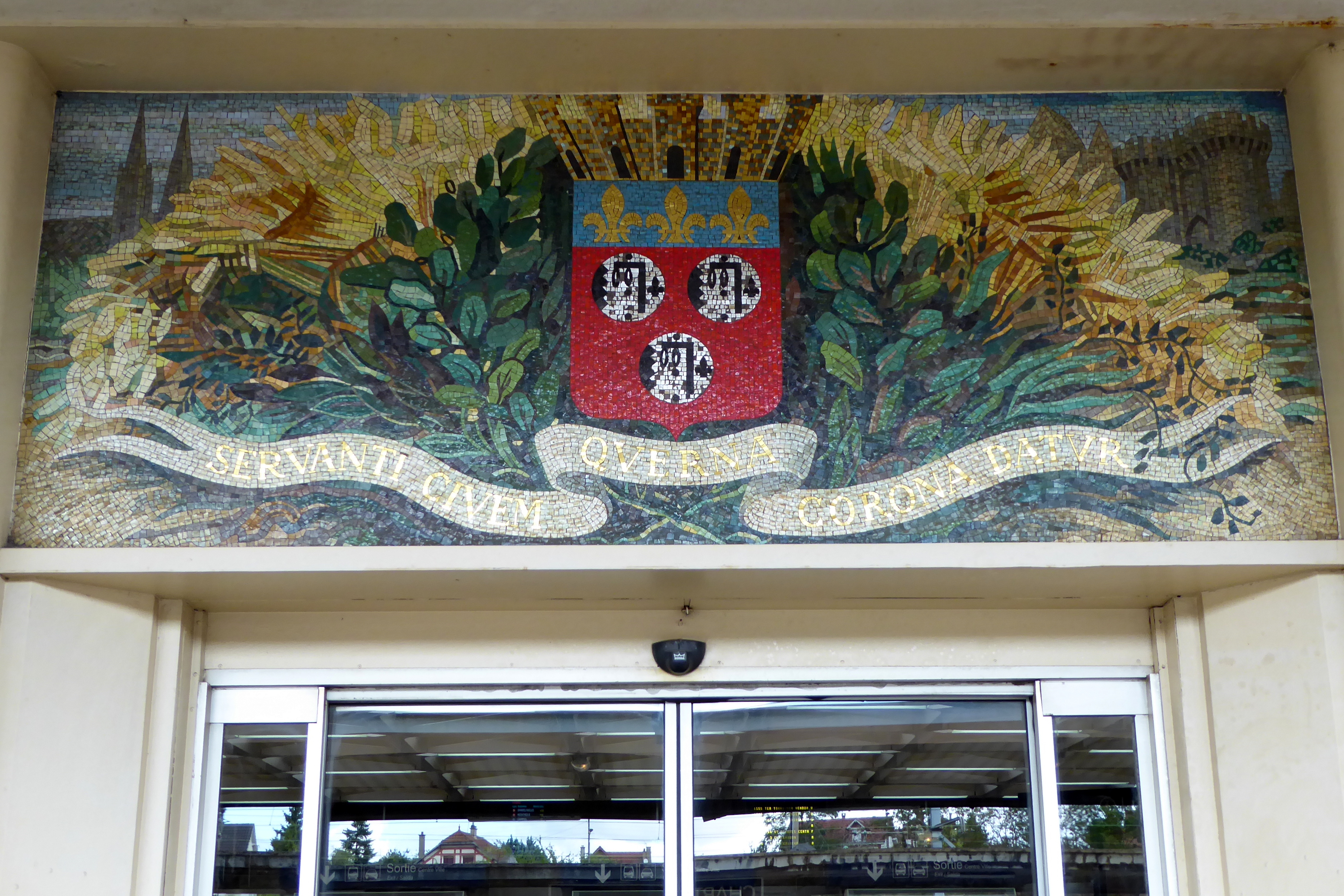 « Servanti civem qverna corona datvr » : à celui qui sauve un citoyen une couronne de chêne est donnée. Devise de la ville de Chartres (Eure-et-Loir), figurant sur la mosaïque de la gare, au-dessus de la porte entre les quais et le hall voyageurs.